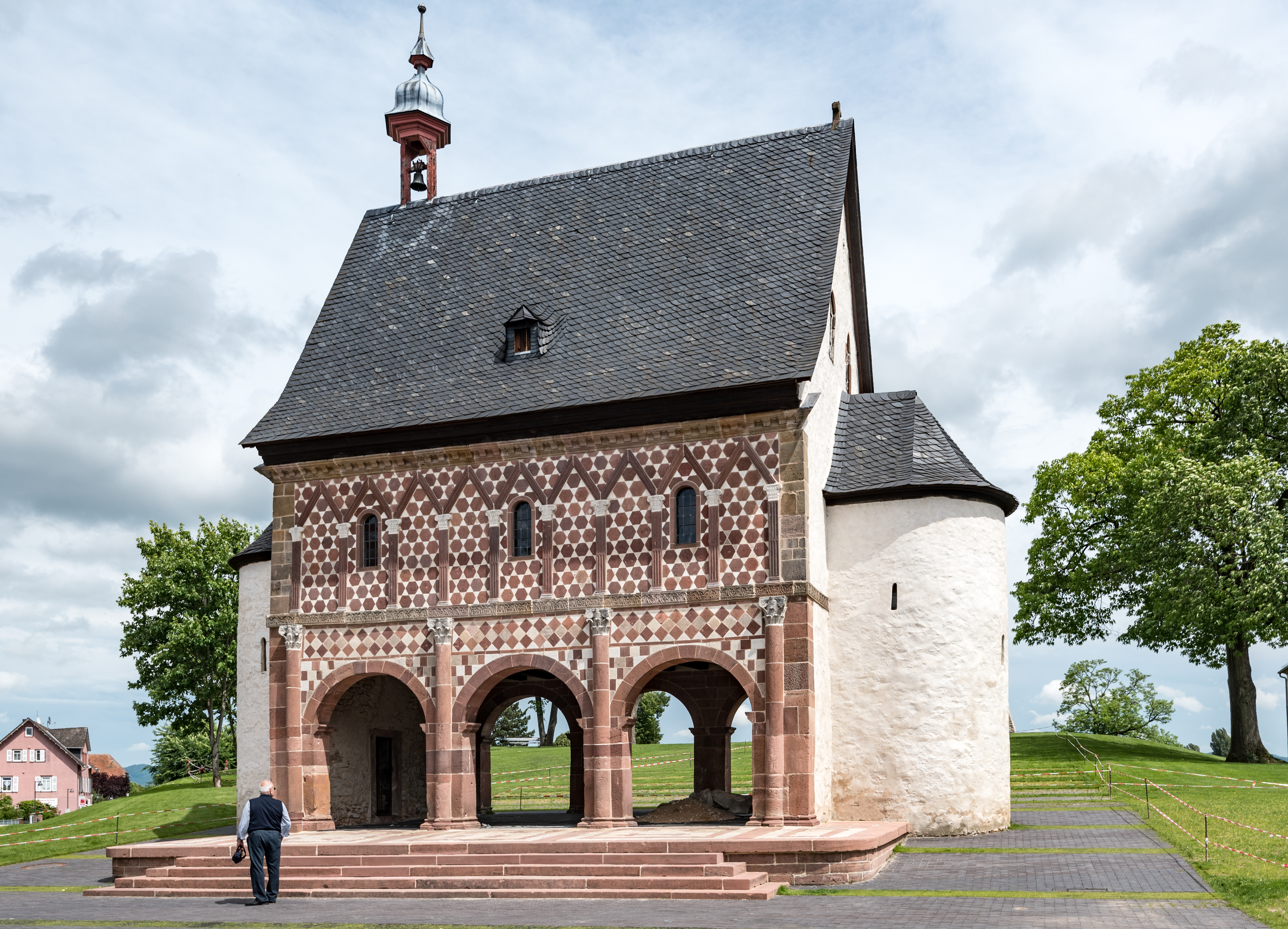 Lorsch, Kloster, Torhalle, Ansicht von Westen